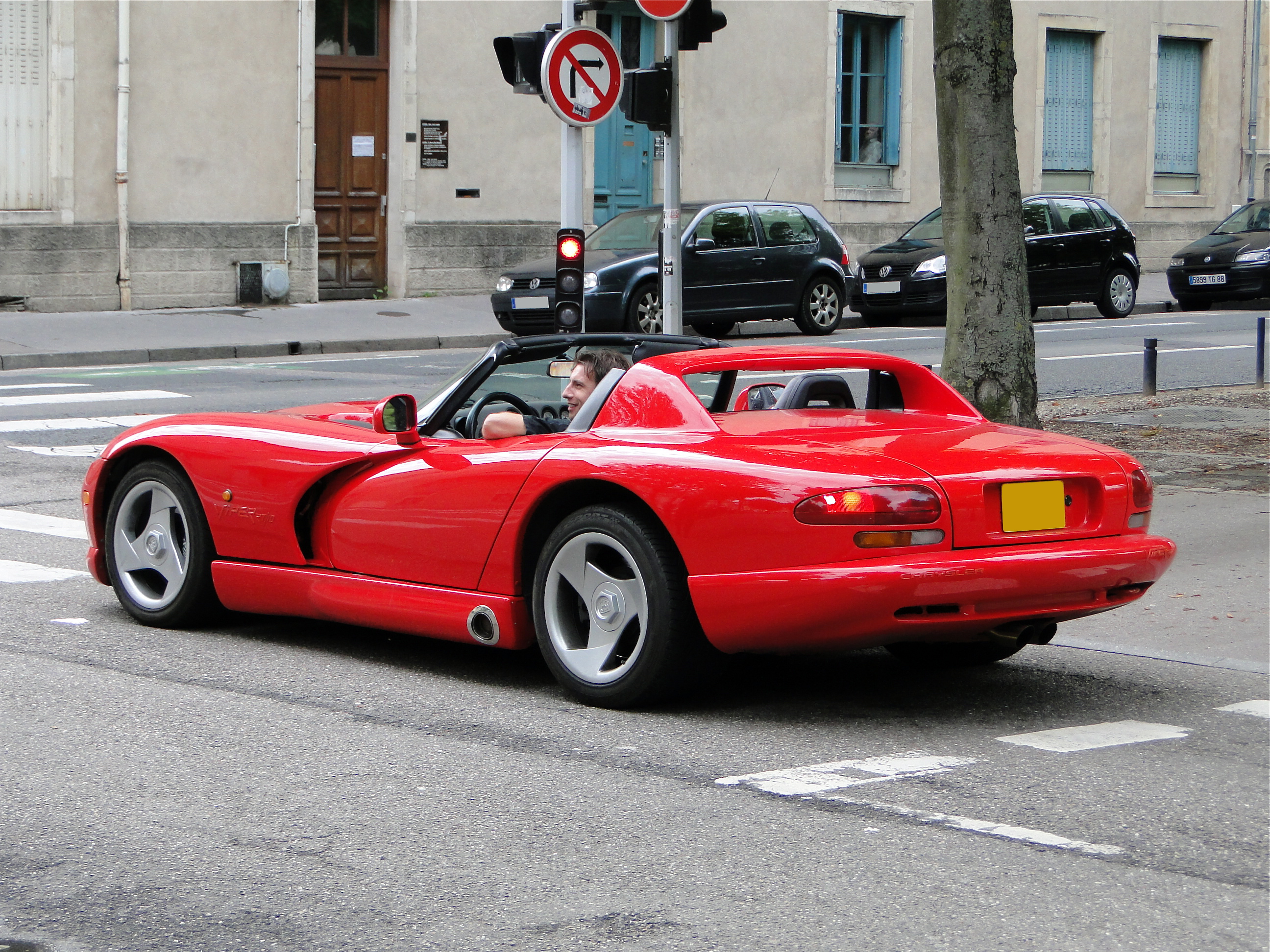 Dodge Viper RT/10